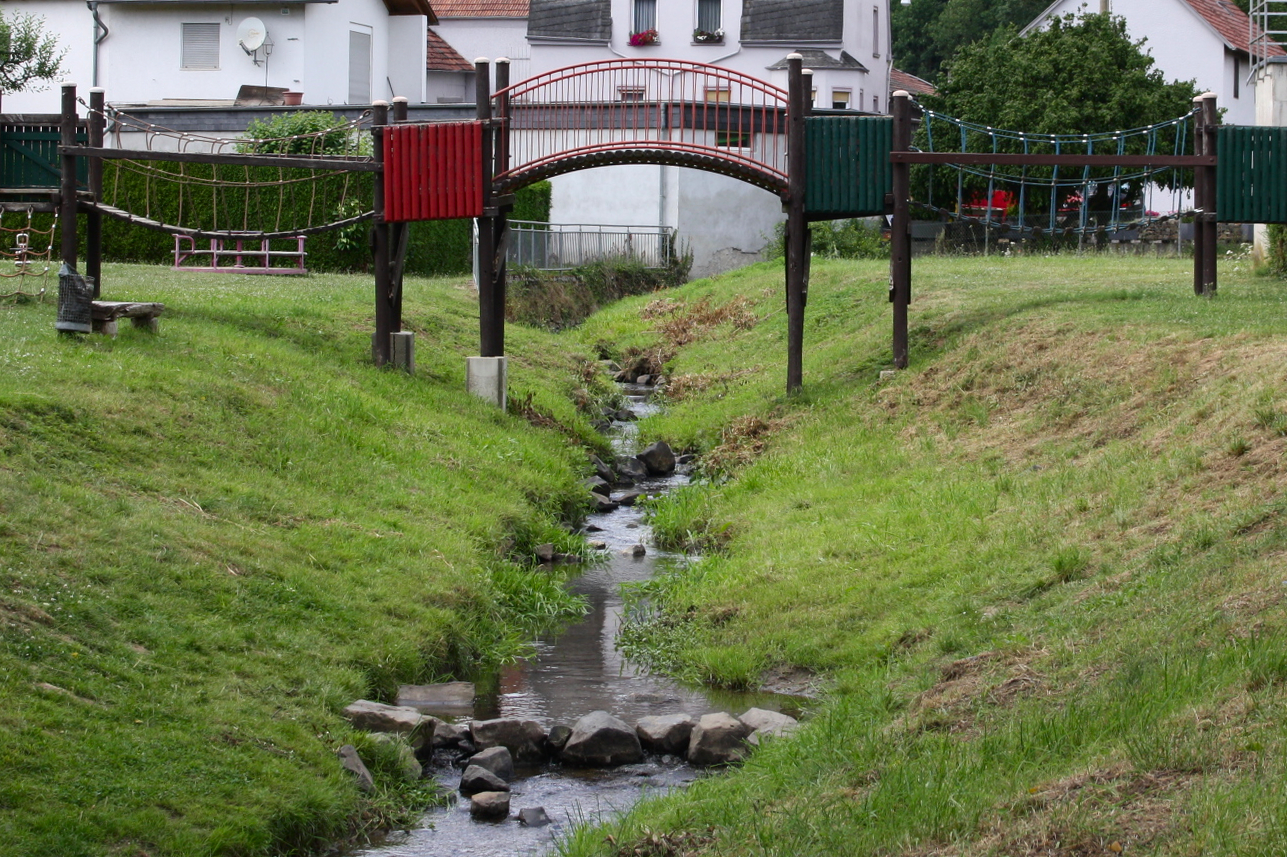 Der Hambach (Lahn) in Aull, Rhein-Lahn-Kreis, Rheinland-Pfalz, Deutschland